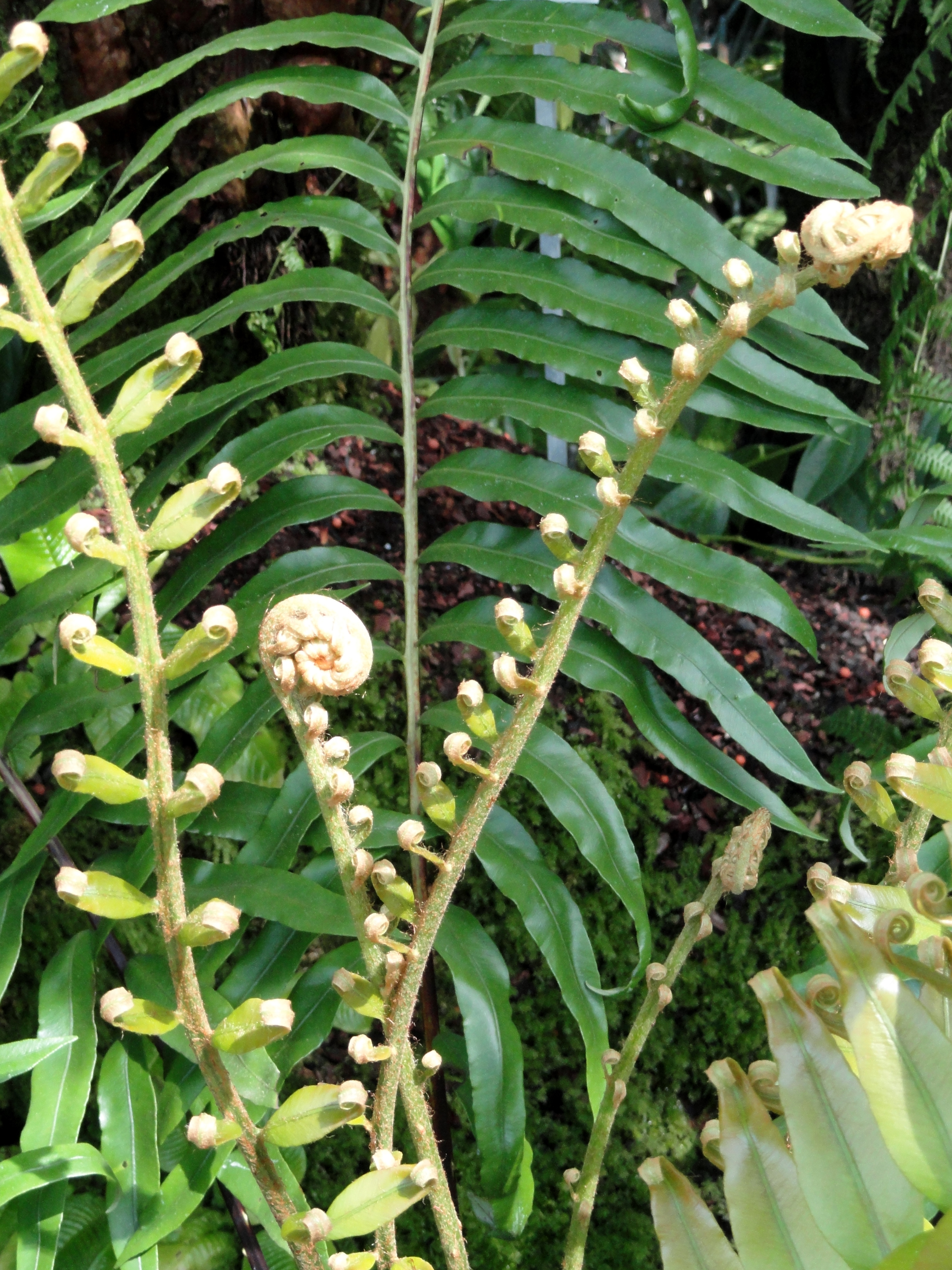 Blechnum tabulare specimen in the Botanischer Garten München-Nymphenburg, Munich, Germany.